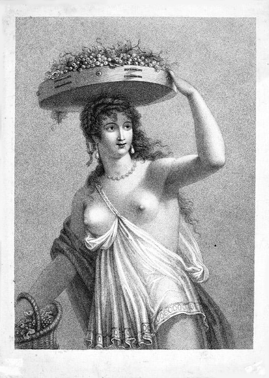 Incisore italiano della seconda metà del XVIII secolo: Donna seminuda con un cesto di uva sulla testa. Museo del vino di Torgiano, Italia